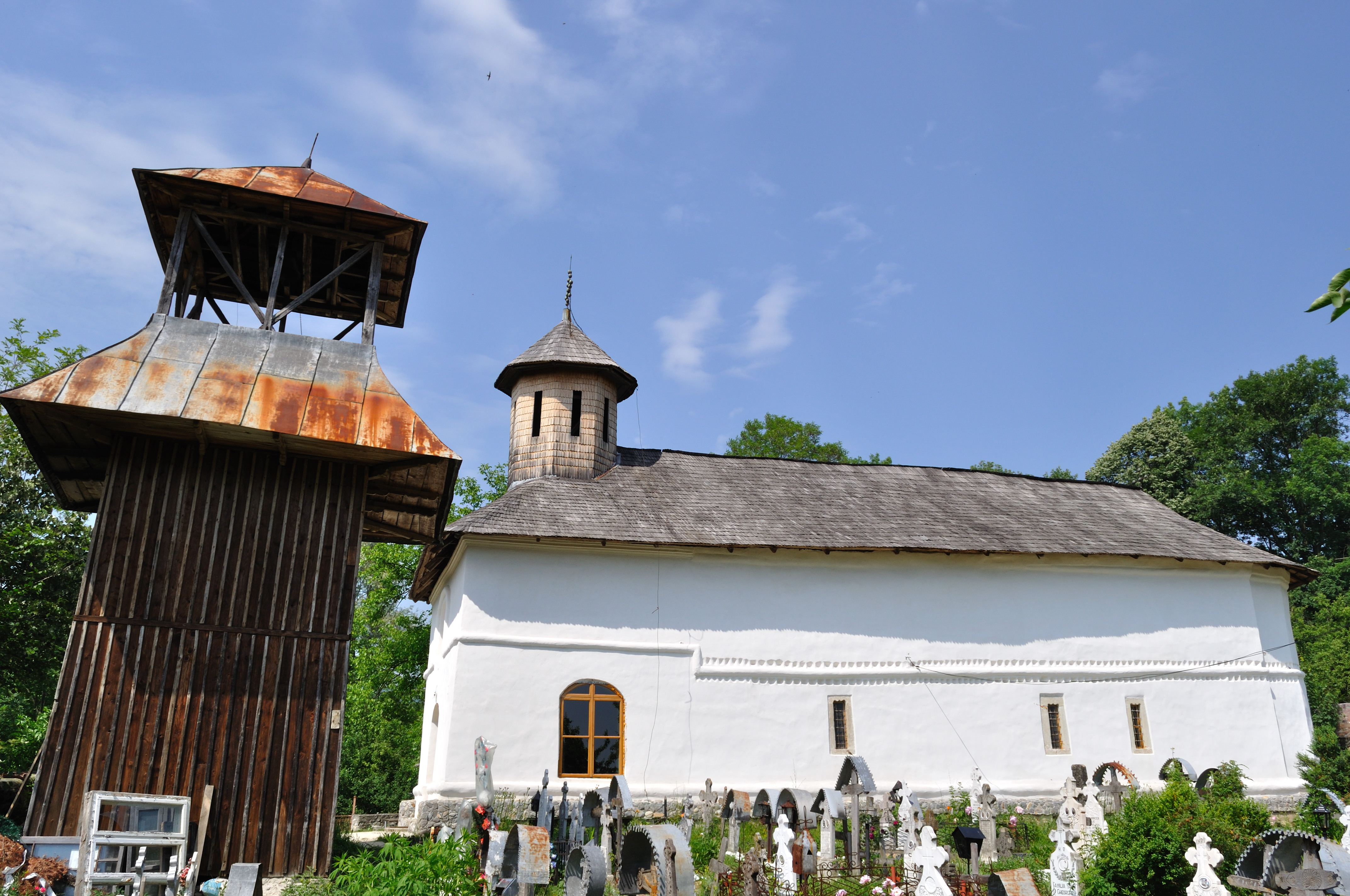 Biserica, monument istoric, din Bodești-Vâlcea